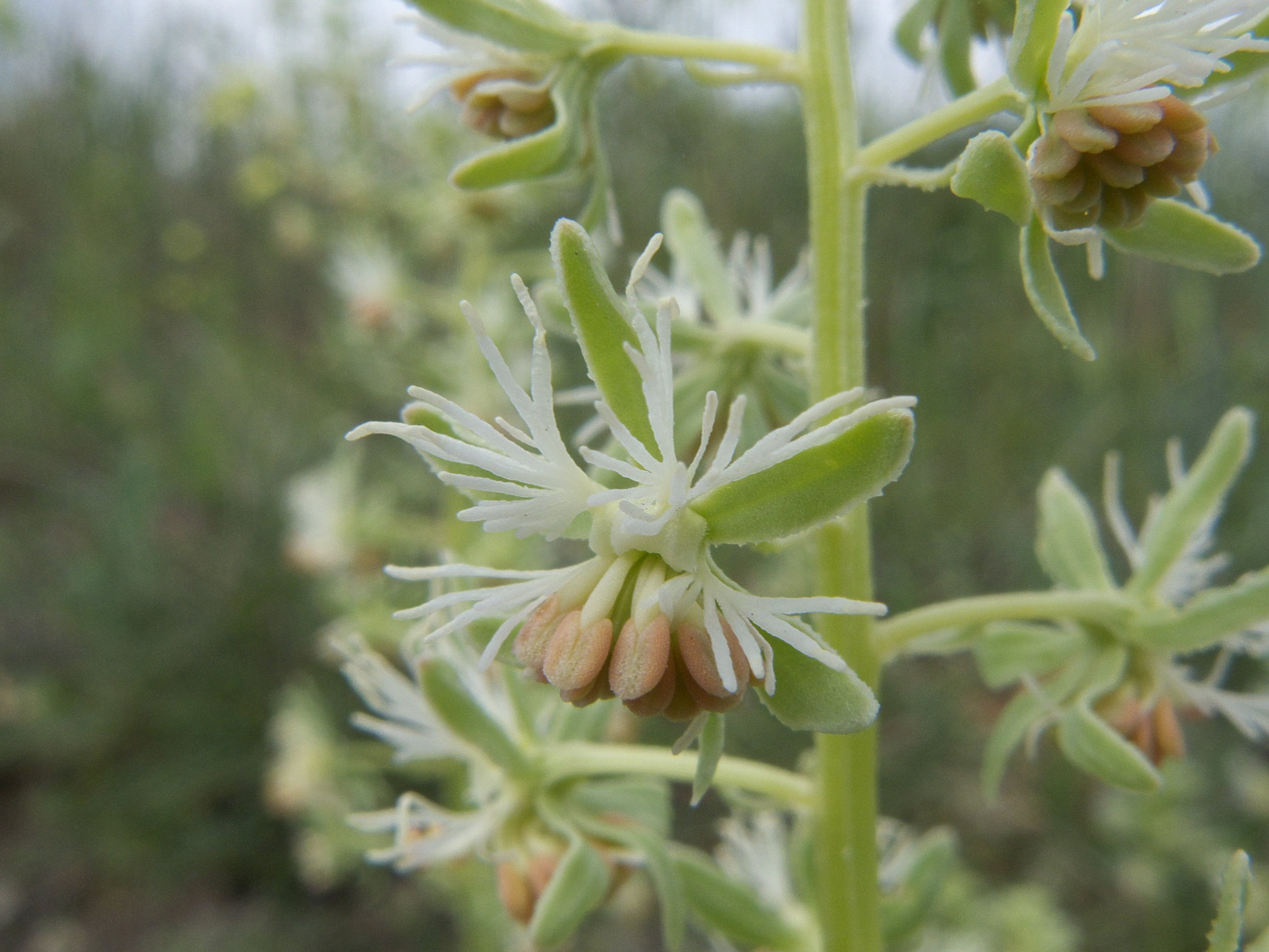 Flor de Reseda phytema"" (Resedaceae, Brassicales). Rivas Vaciamadrid, Madrid.